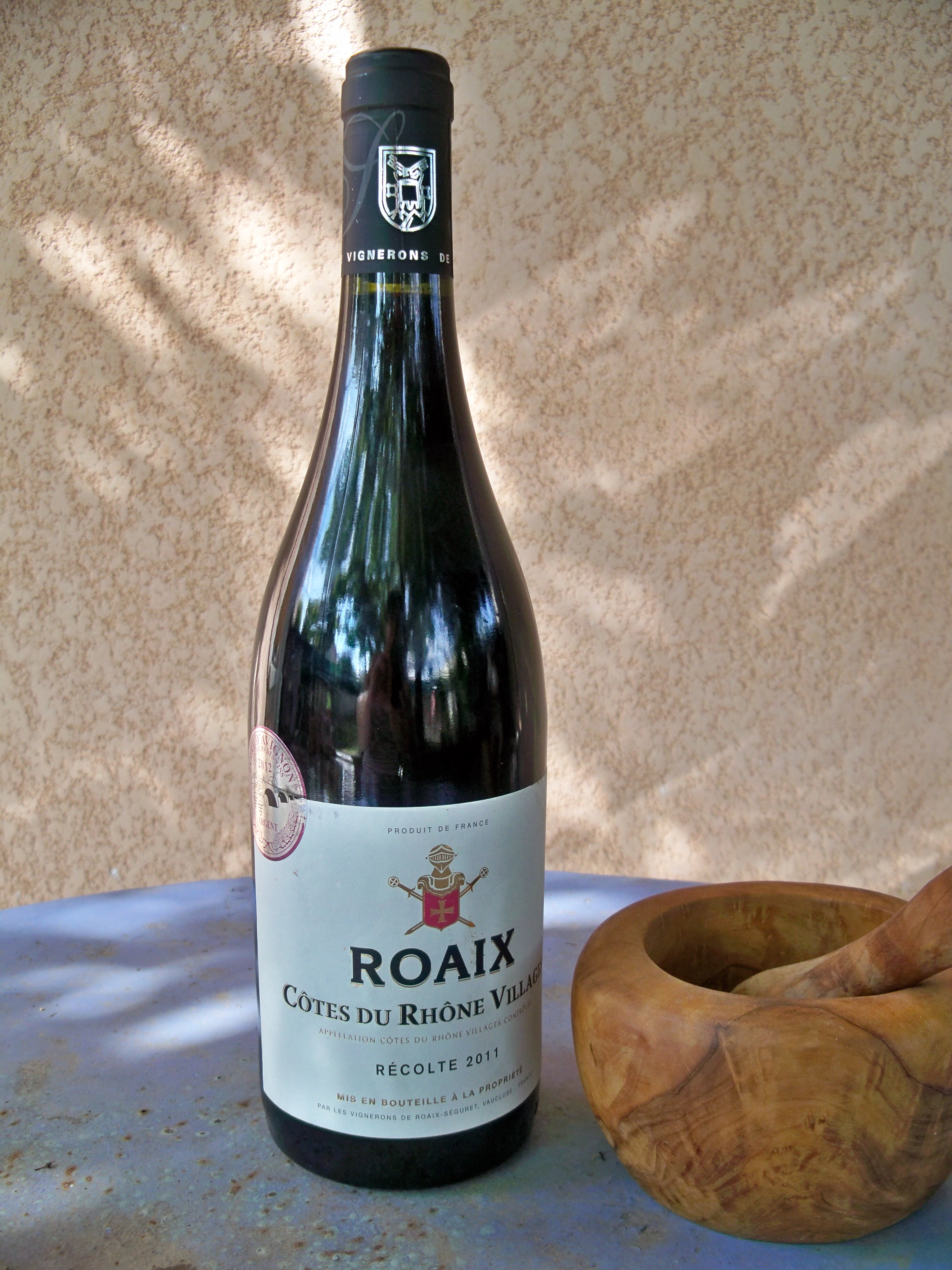 Roaix rouge - 2011 - côtes du rhône village